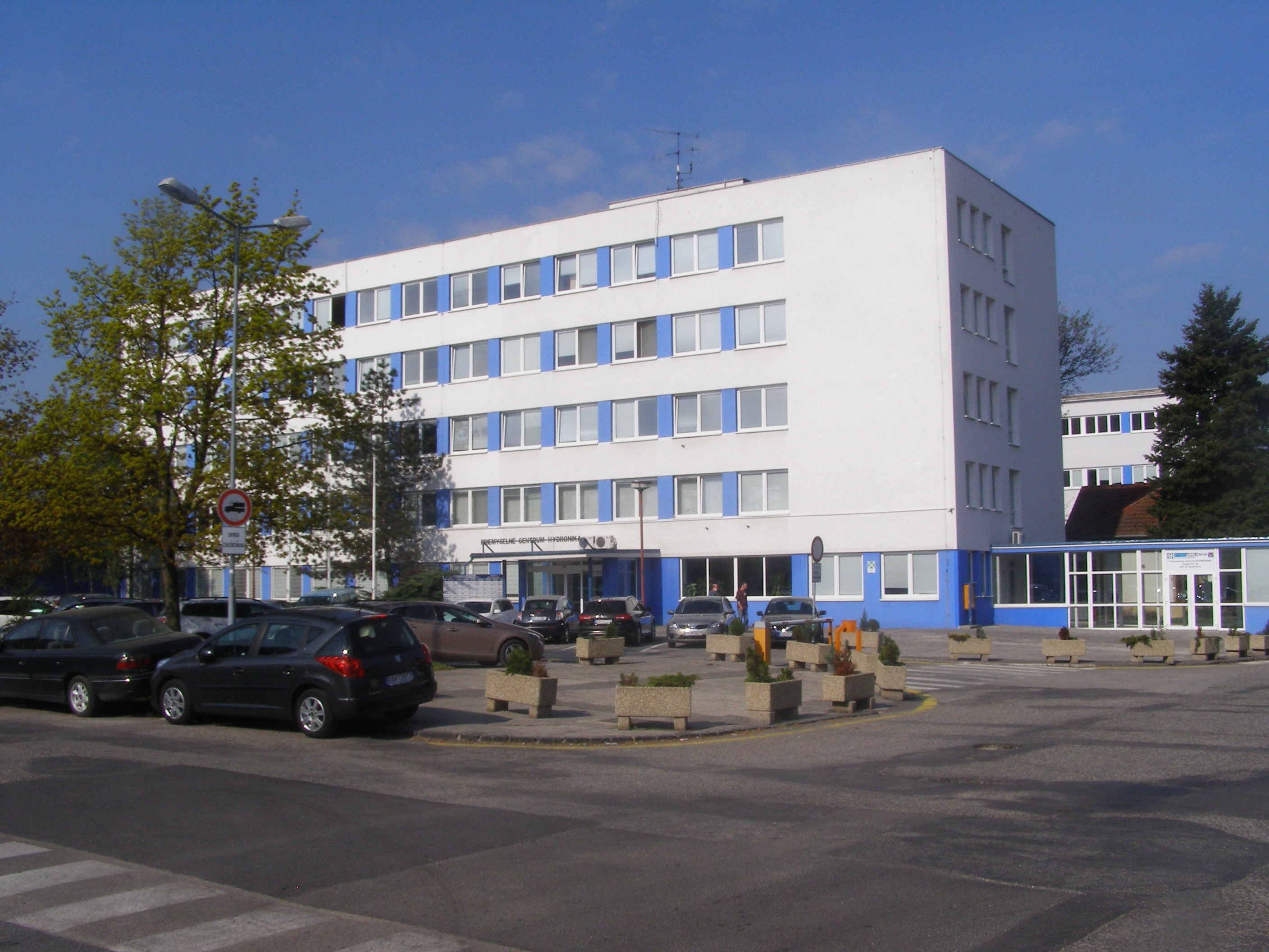 Hydronika, Gogoľova street, Bratislava